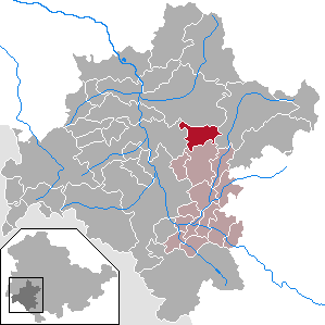 Christes in Thuringia - District Schmalkalden-Meiningen